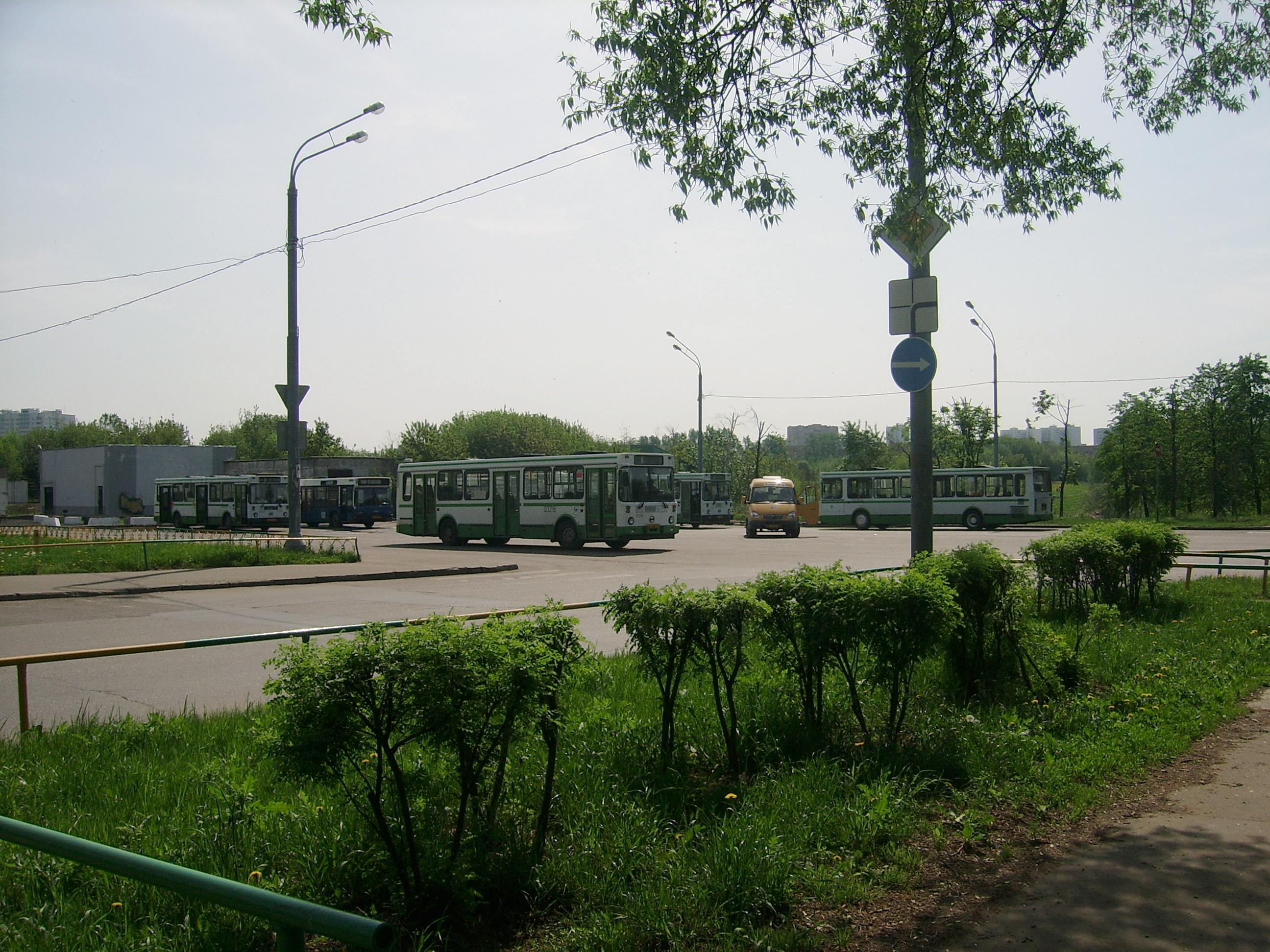 Вид на угол Заревого проезда и проезда Шокальского в Москве.